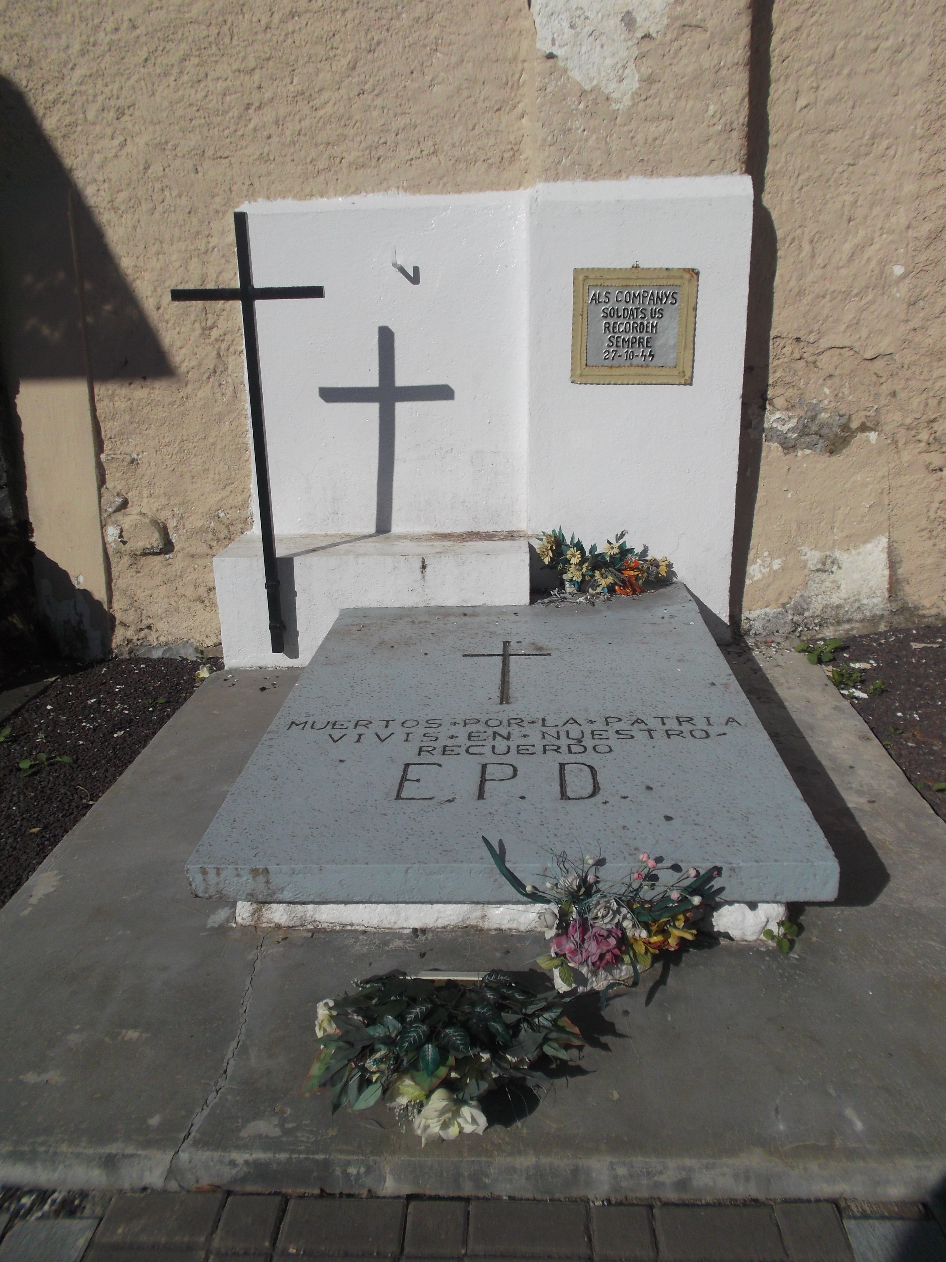 Tomba dels guerrillers caiguts a la invasió de la Vall d'Aran, 1944